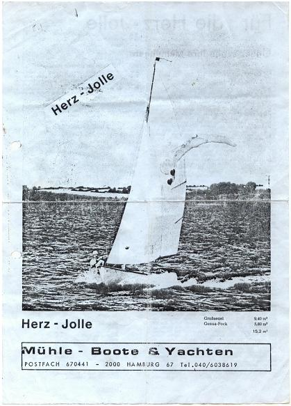 Kopie eines Werbeprospekts der Firma Mühle Boote und Yachten, Hamburg, Deutschland